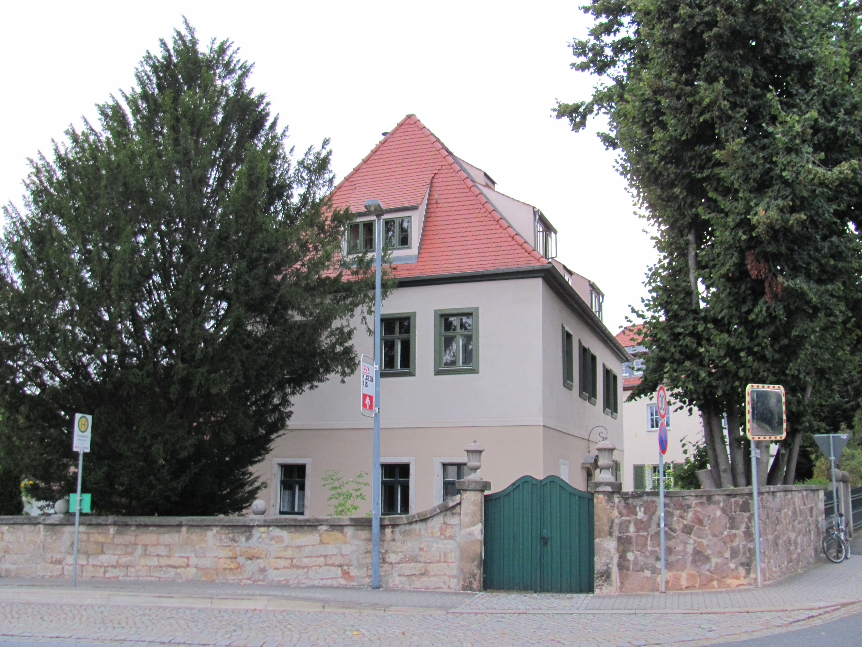 Radebeul Kyau-Haus